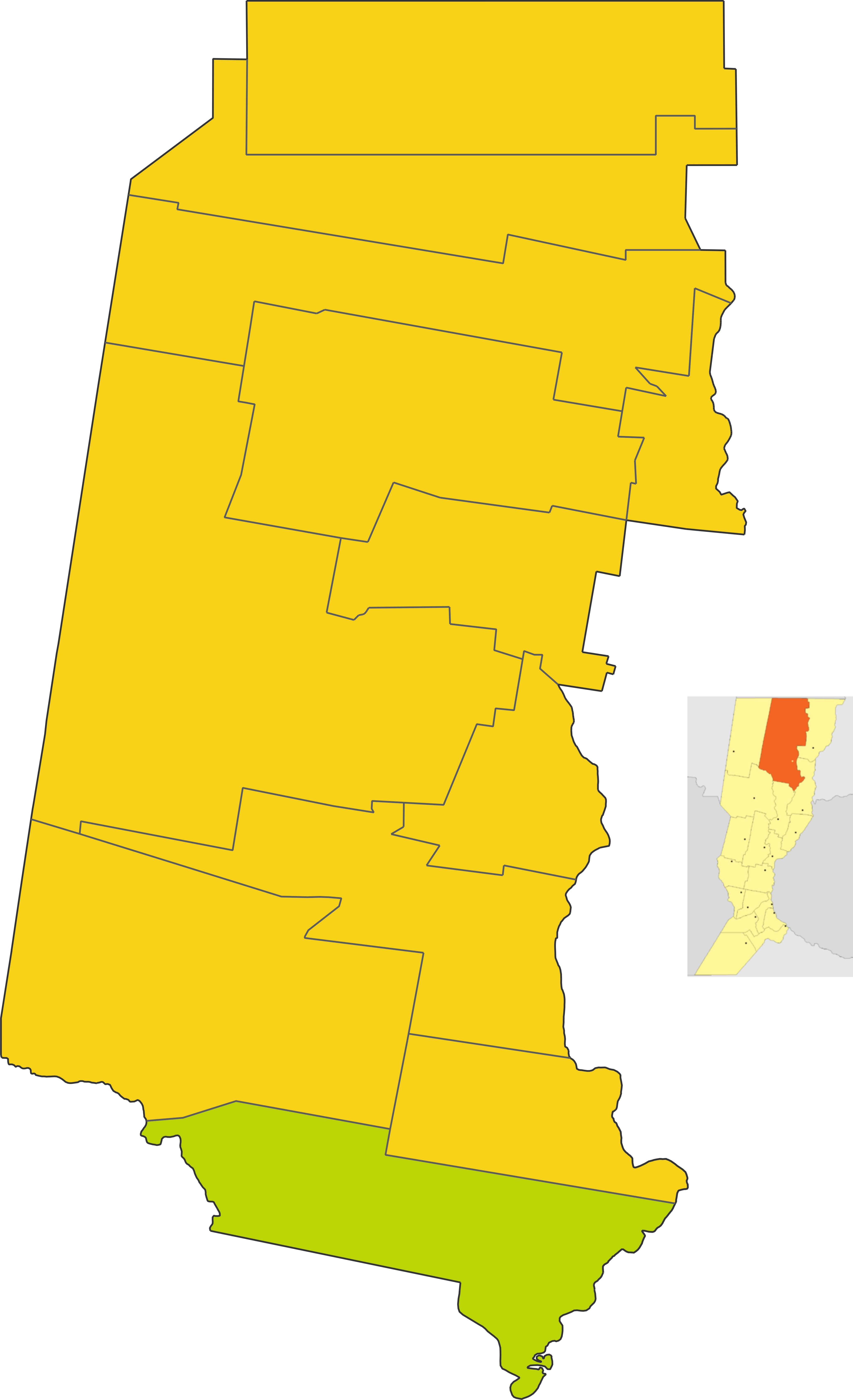 Map of the municipio de Calchaqui in Vera department, Santa Fe province, Argentina